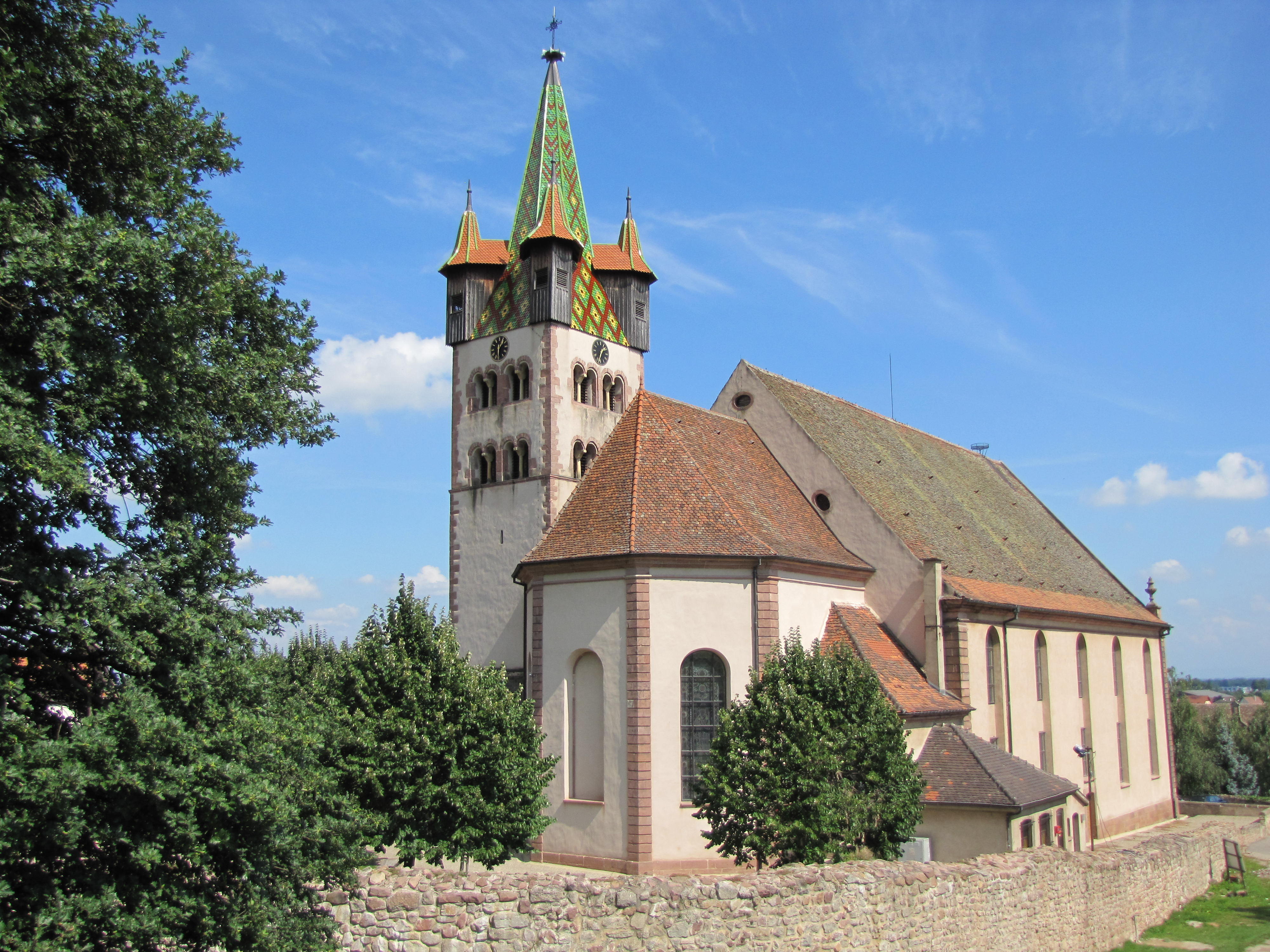 Alsace, Bas-Rhin, Église Saint-Georges de Châtenois (PA00084665, IA00124434).